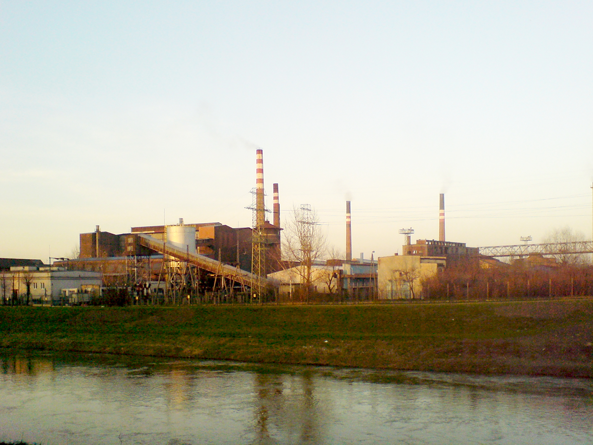 Dawny Zakład Elektrod Węglowych w Raciborzu, obecnie SGL Carbon